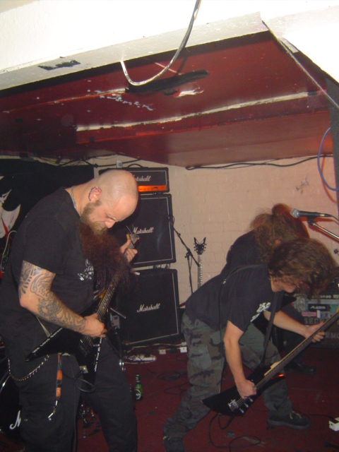 Vomitory